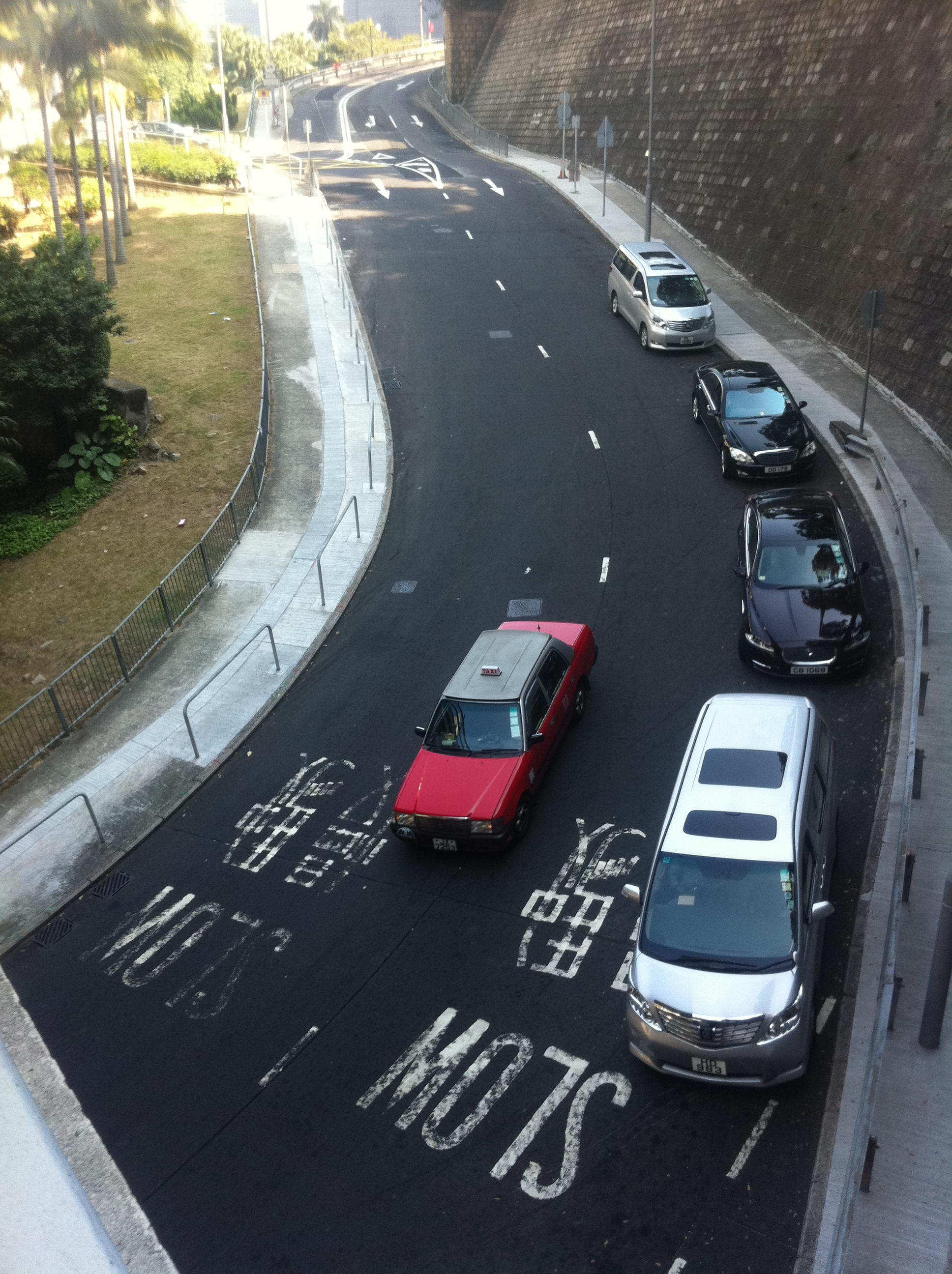 中文（香港）: 香港島 半山區 雅賓利道